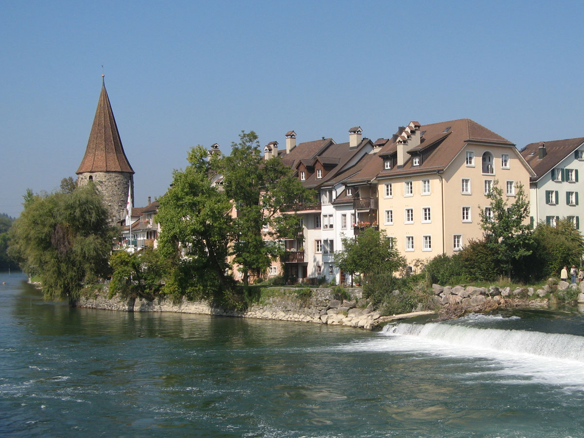 Die Unterstadt von Bremgarten, ganz links der Hexenturm